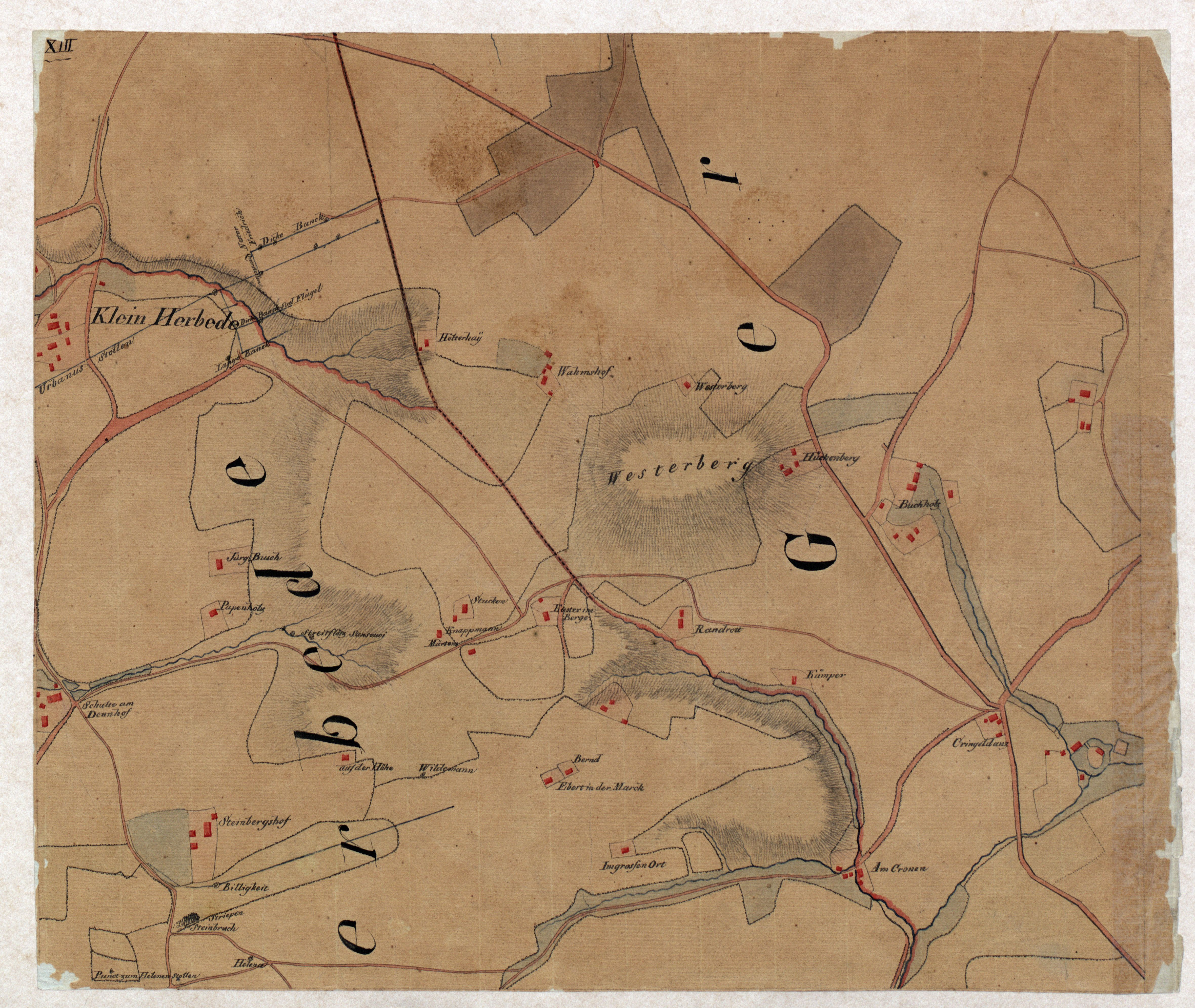 Spezialkarte des mittleren Bergwerkdistrikts des Amts Bochum Nachdruck als „Carte speciale des mines“.